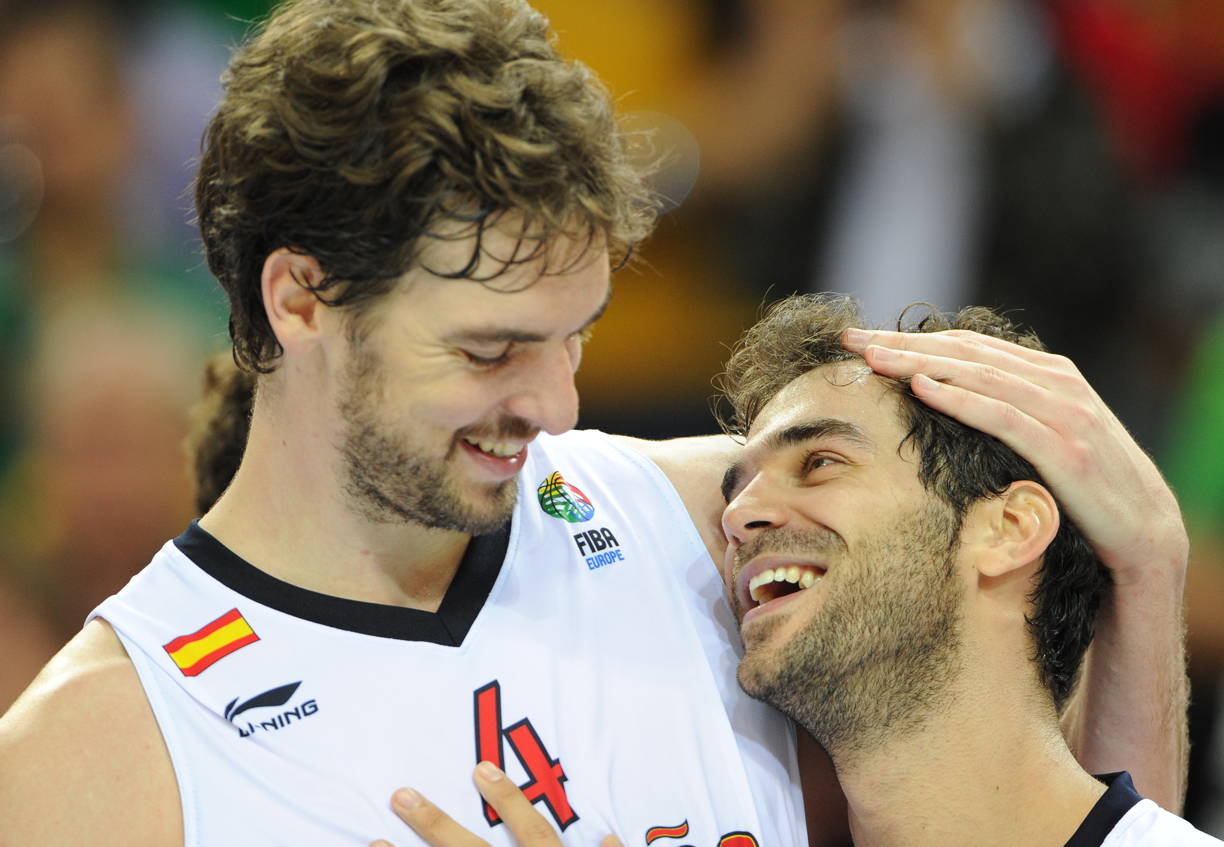 Pau Gasol at Eurobasket 2011.